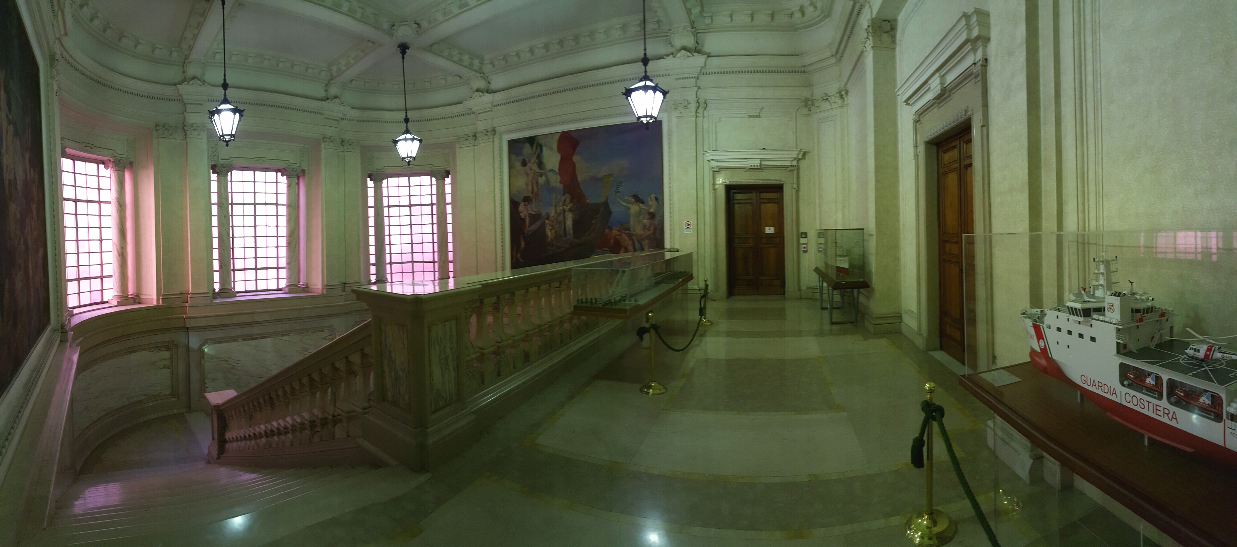 Ministero delle Infrastrutture e dei Trasporti, scalone d'onore.